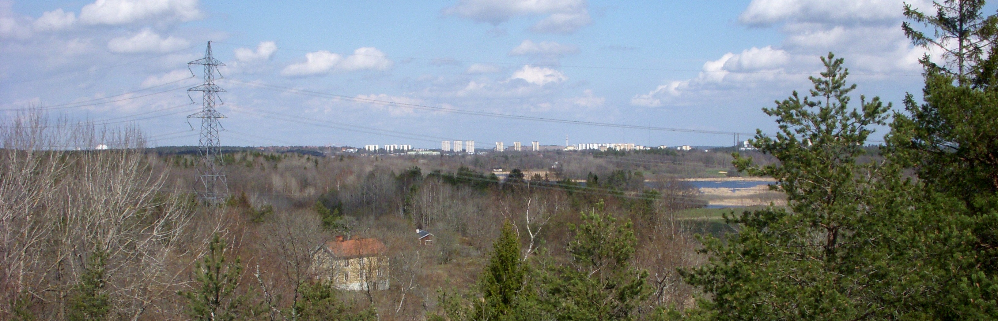 Utsikten från Orlångsjös fornborg mot norr